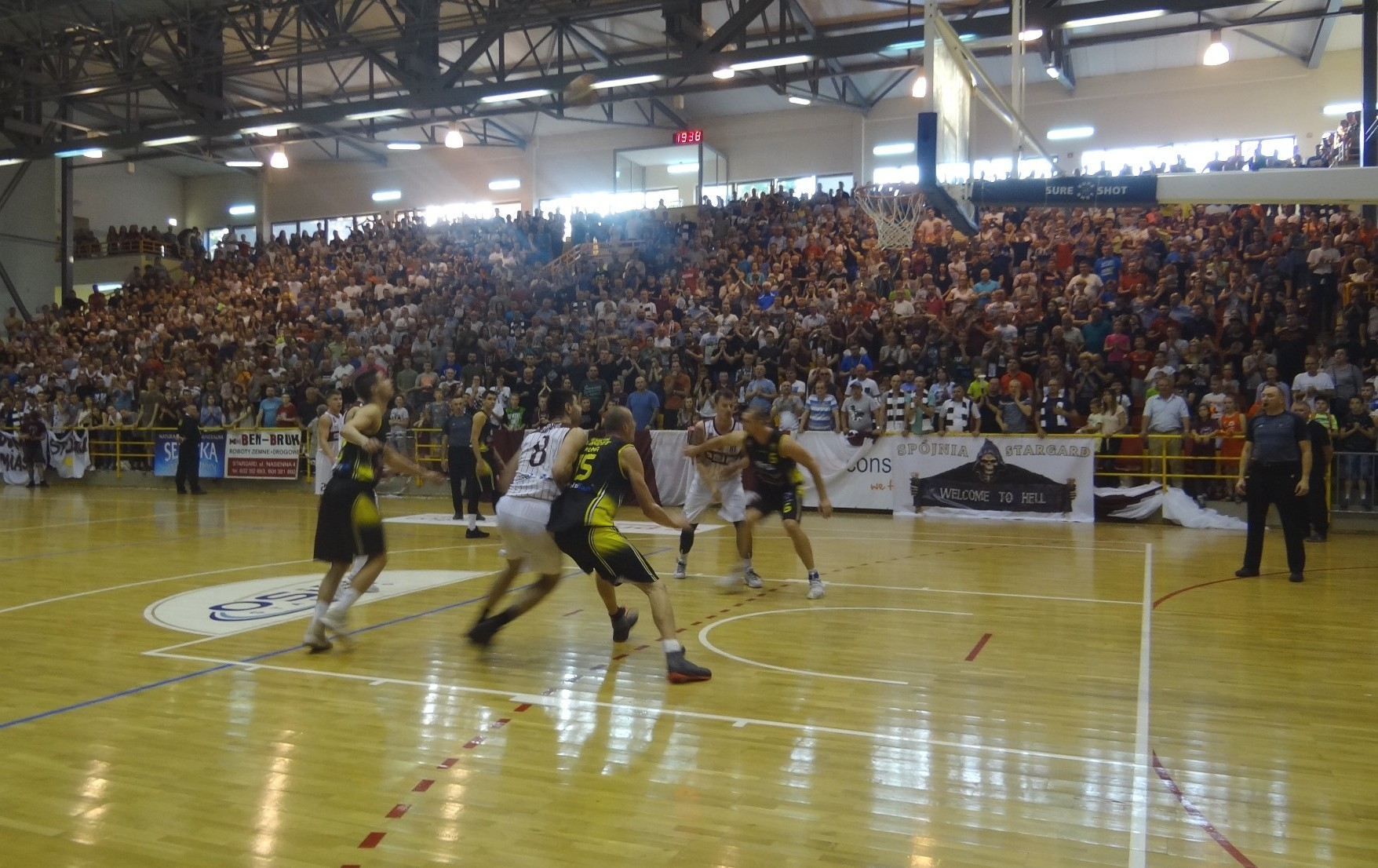 Finał. Spójnia Stargard i Sokół Łańcut (12.05.2018)